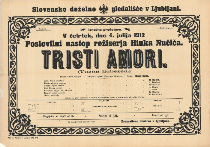 Plakat za Tristi amori - poslovilni nastop režiserja Hinka Nučiča - Tužna ljubezen